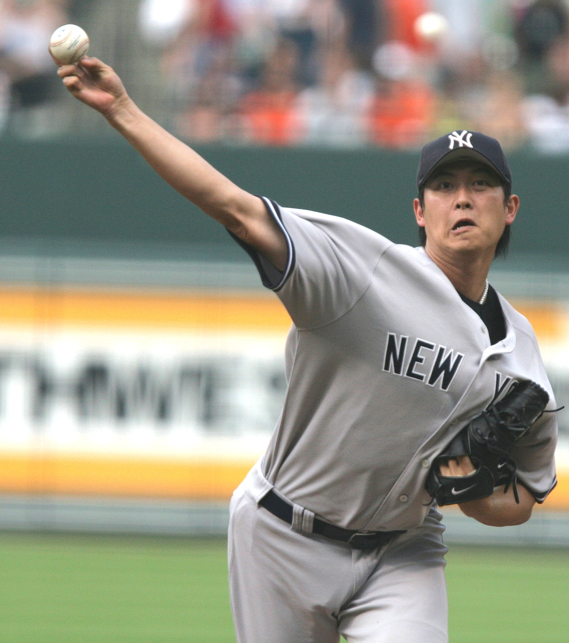 Chien-Ming Wang